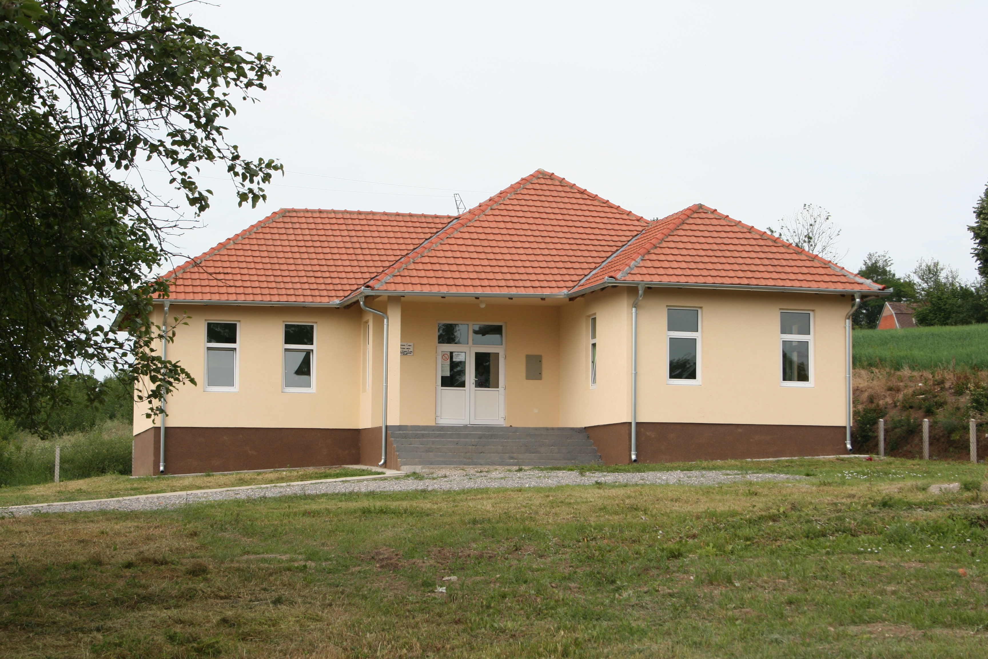 Beljin opština Vladimirci, seoska škola